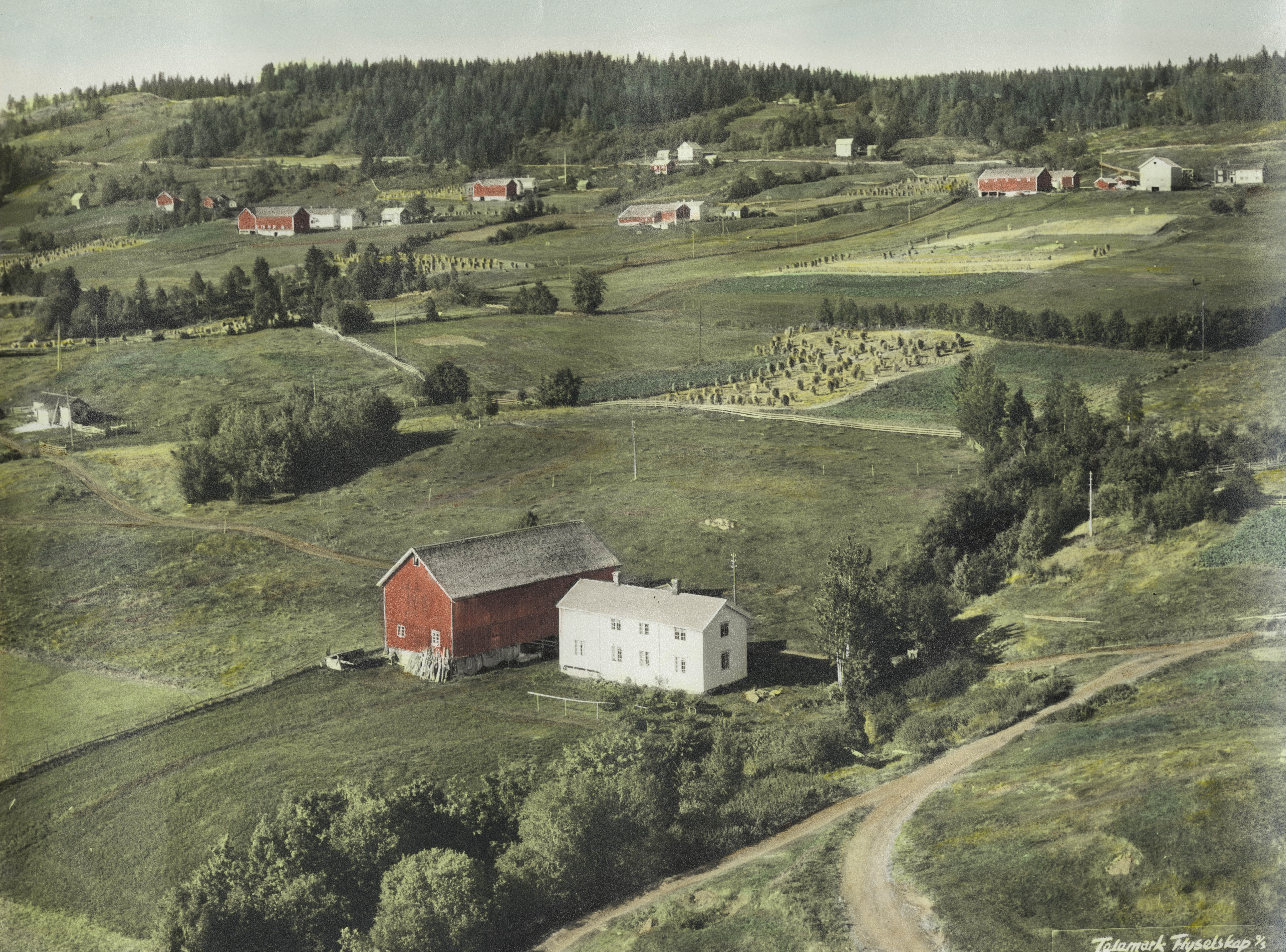 Jåren i Skaun med Morken-grenda i bakgrunnen.